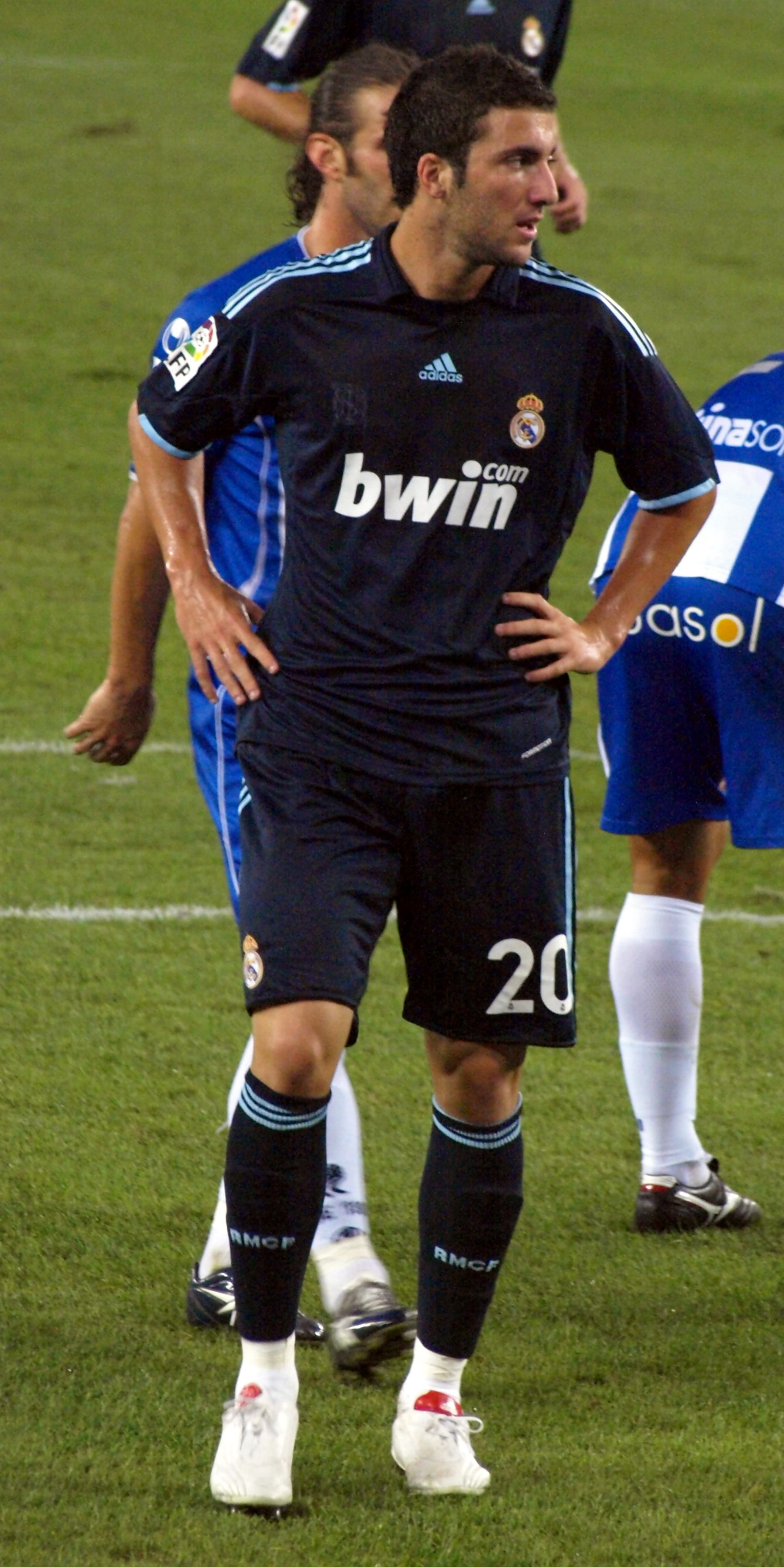 Gonzalo Higuaín en el partido que enfrentó al Real Madrid con el RCD Español en el Estadio de Cornellá-El Prat de la primera vuelta de La Liga 2009/10.